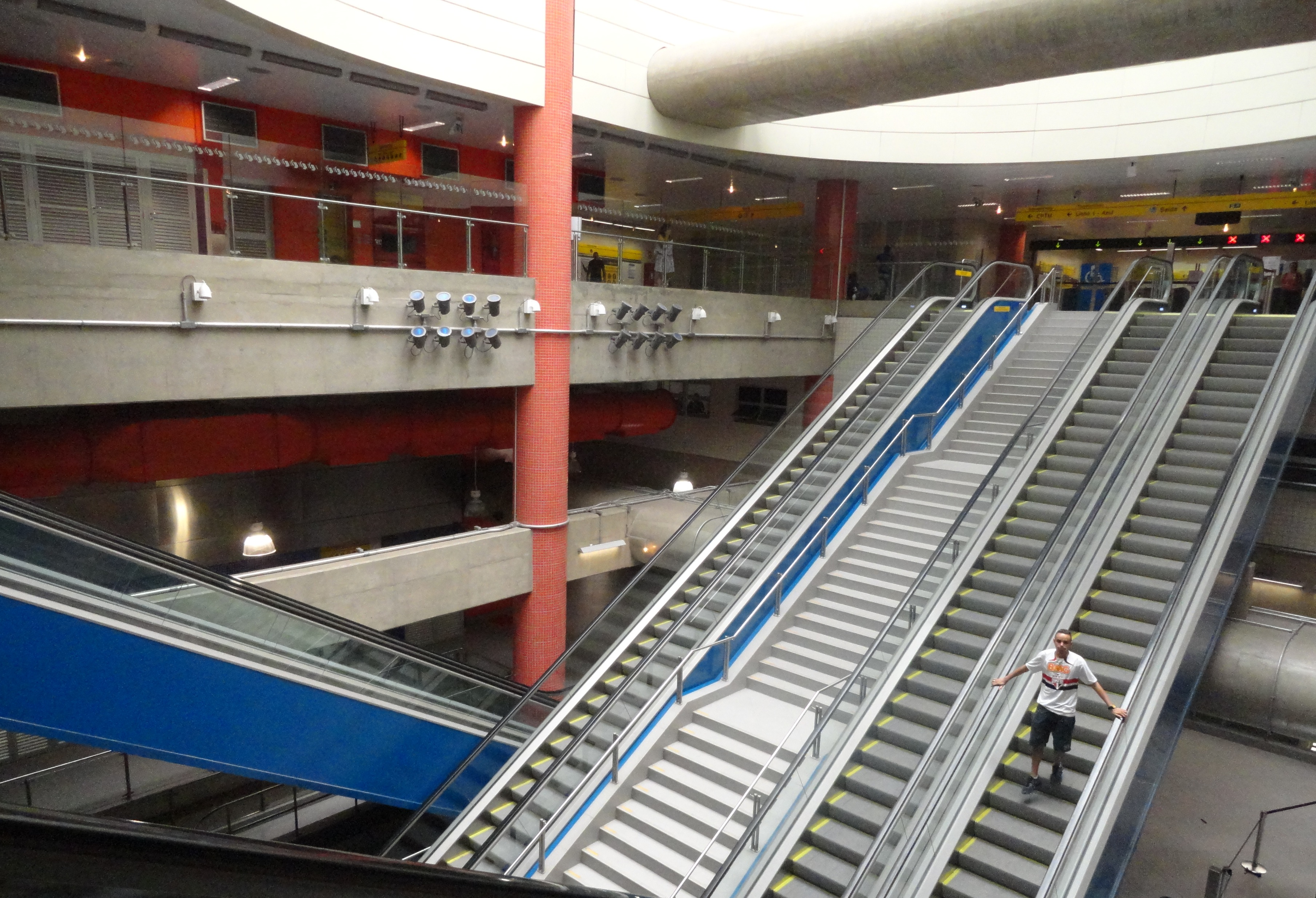 Metrô São Paulo